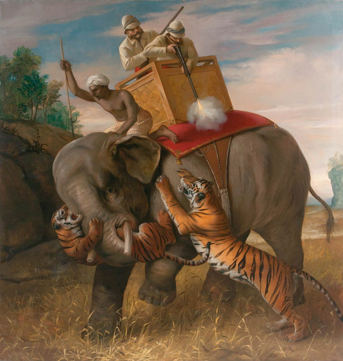 "Tigerjagd", Öl auf Leinwnad, 121 x 108 cm